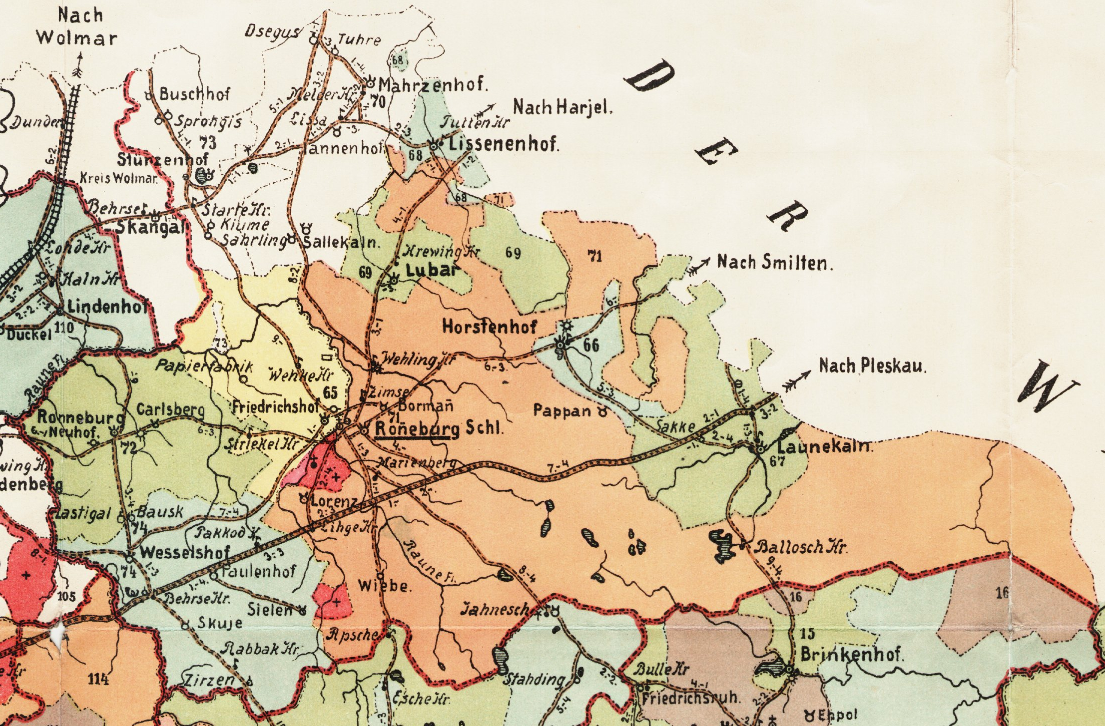 Võnnu kreisi Rauna kihelkonna mõisad 1903. aasta kaardil.